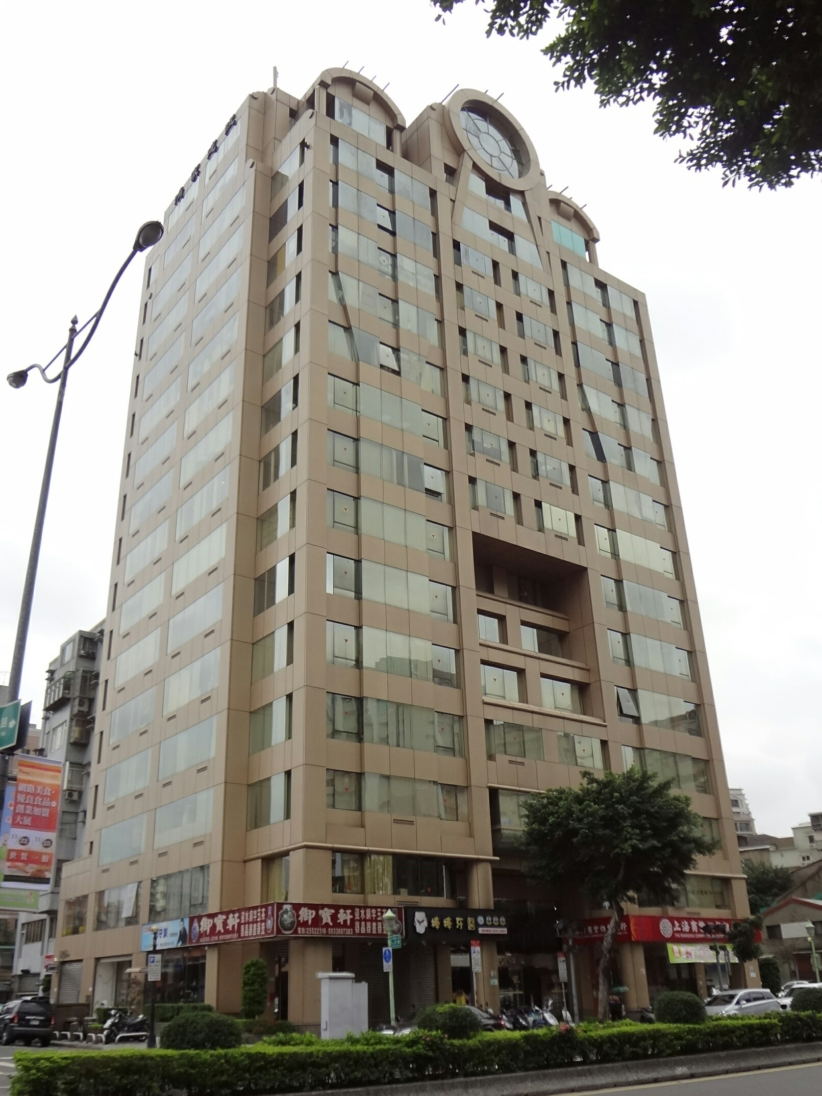 首府經貿大廈，位於臺灣臺北市大同區承德路二段，東立出版社總部設於81號10樓。